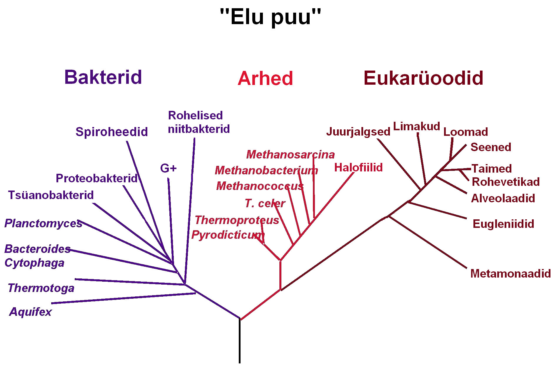 Fülogeneetiline elu puu 16s rRNA subühiku analüüsi alusel.